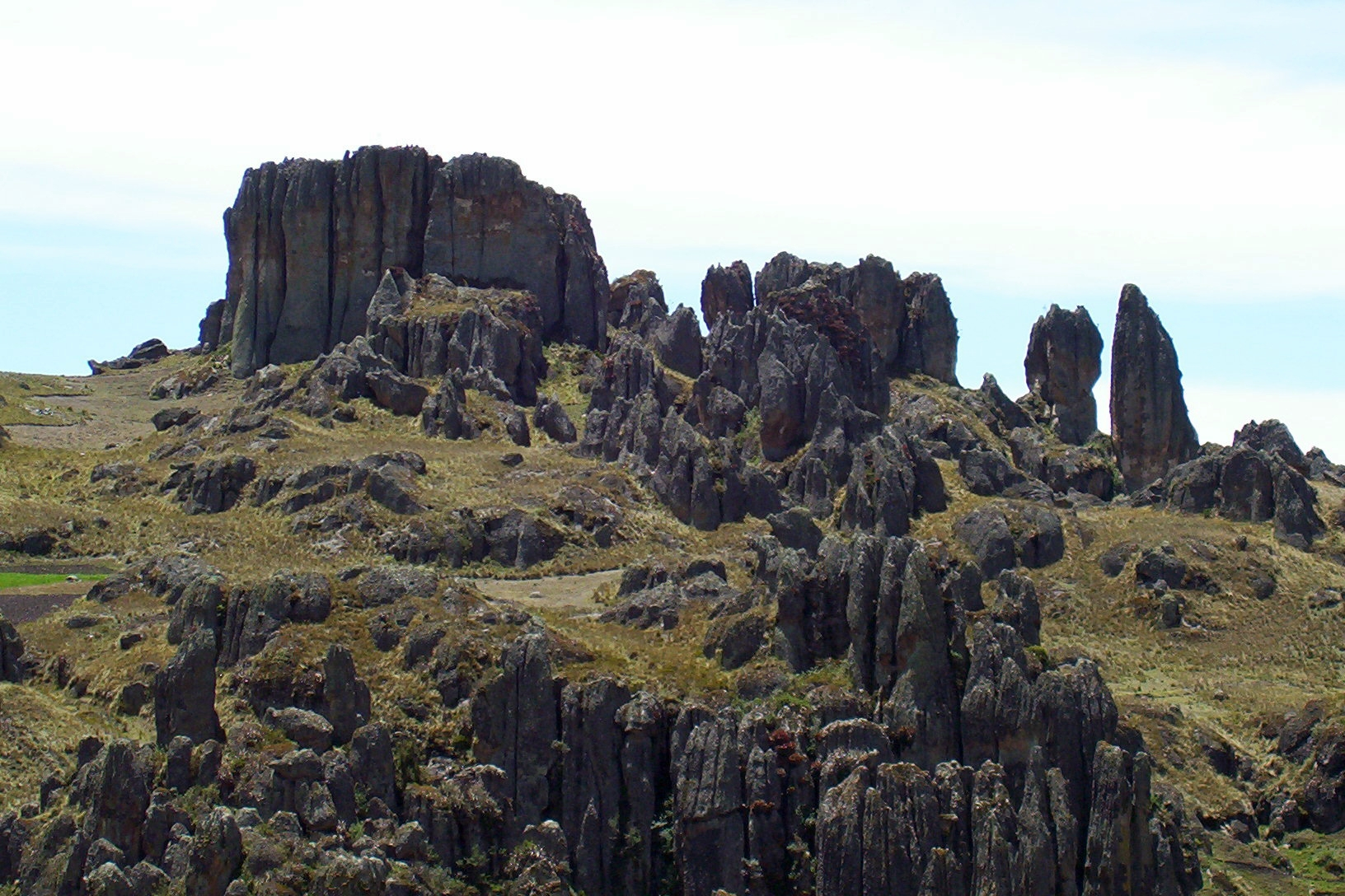 Páramo o jalca de frailones (formaciones rocosas), Cajamarca, Perú